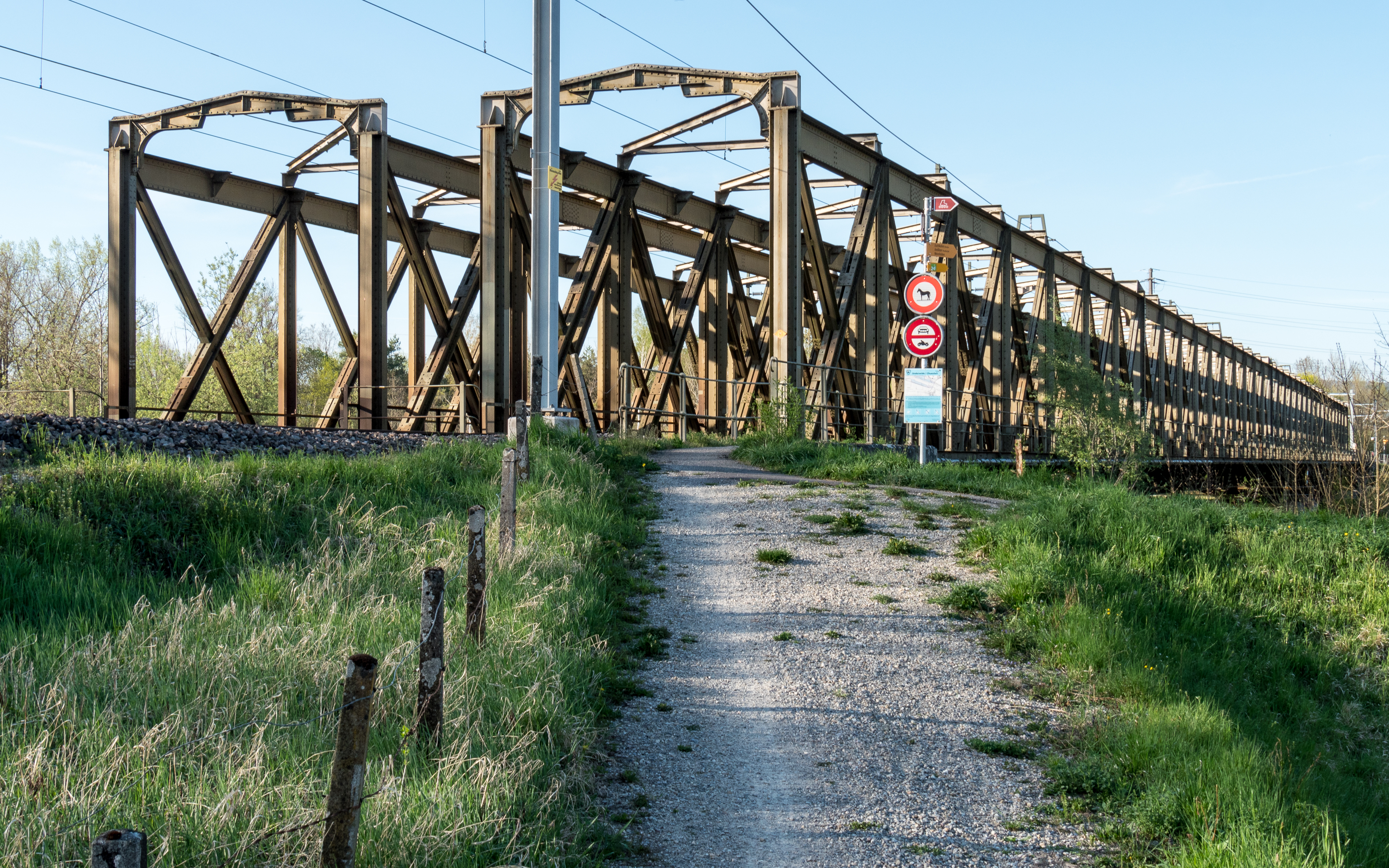 Bahnlinie Winterthur - Romanshorn: Eschikofer Eisenbahnbrücke über die Thur.